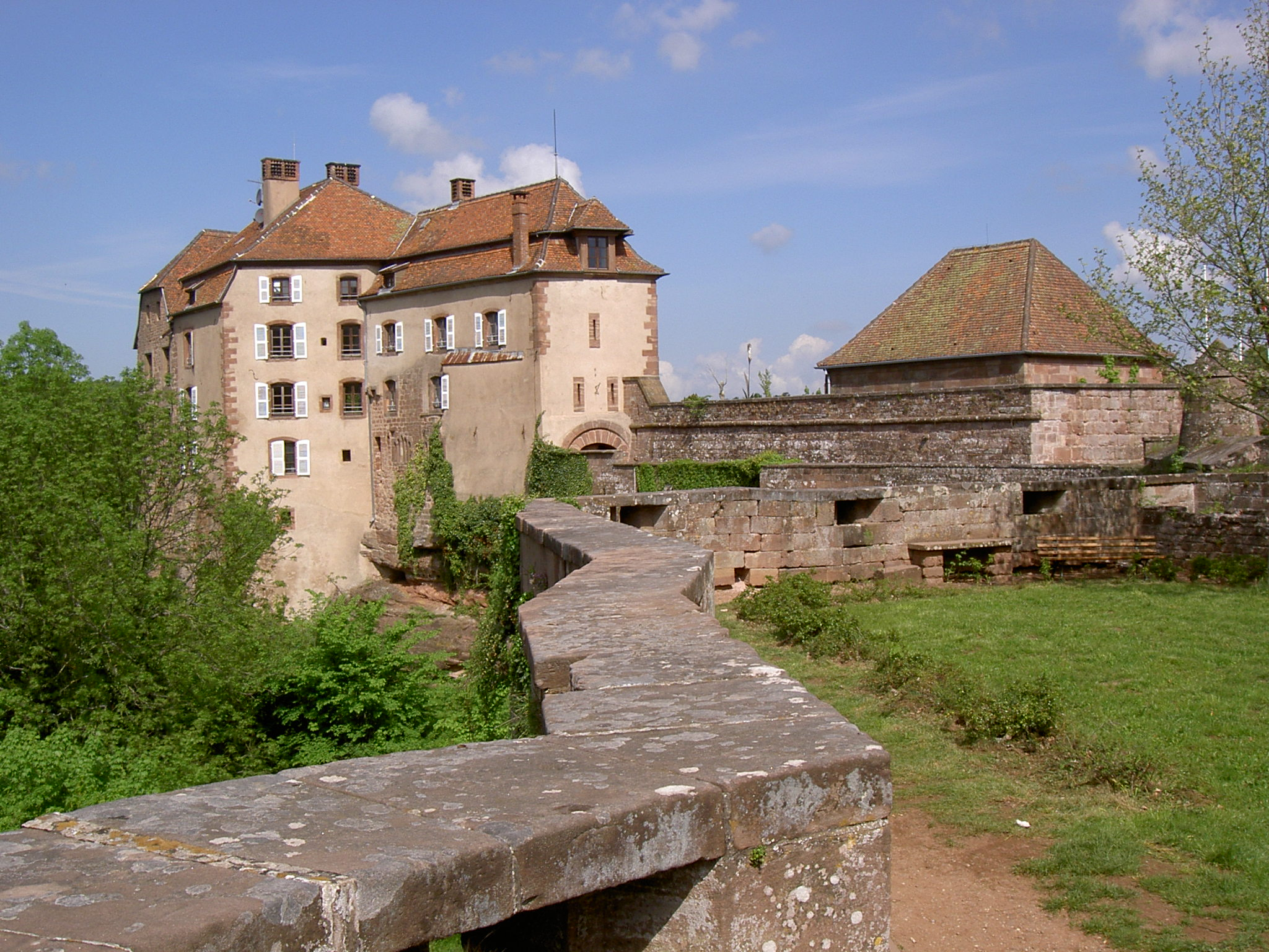 Nordvogesen 2004 La Petite Pierre